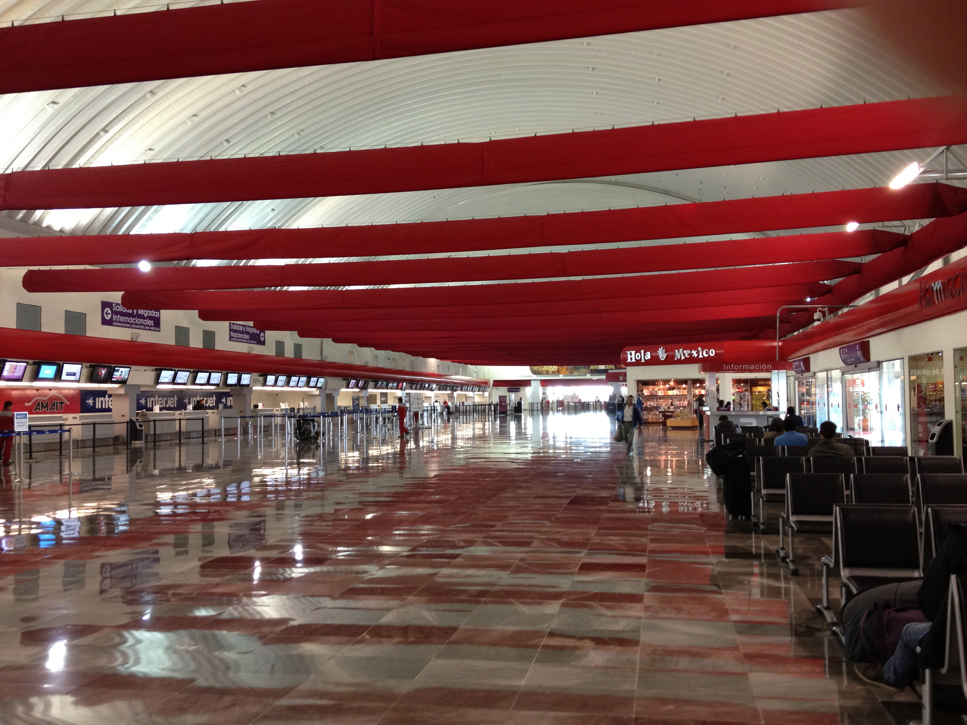 Aeropuerto Lic. Adolfo Lopez Mateos (interior)